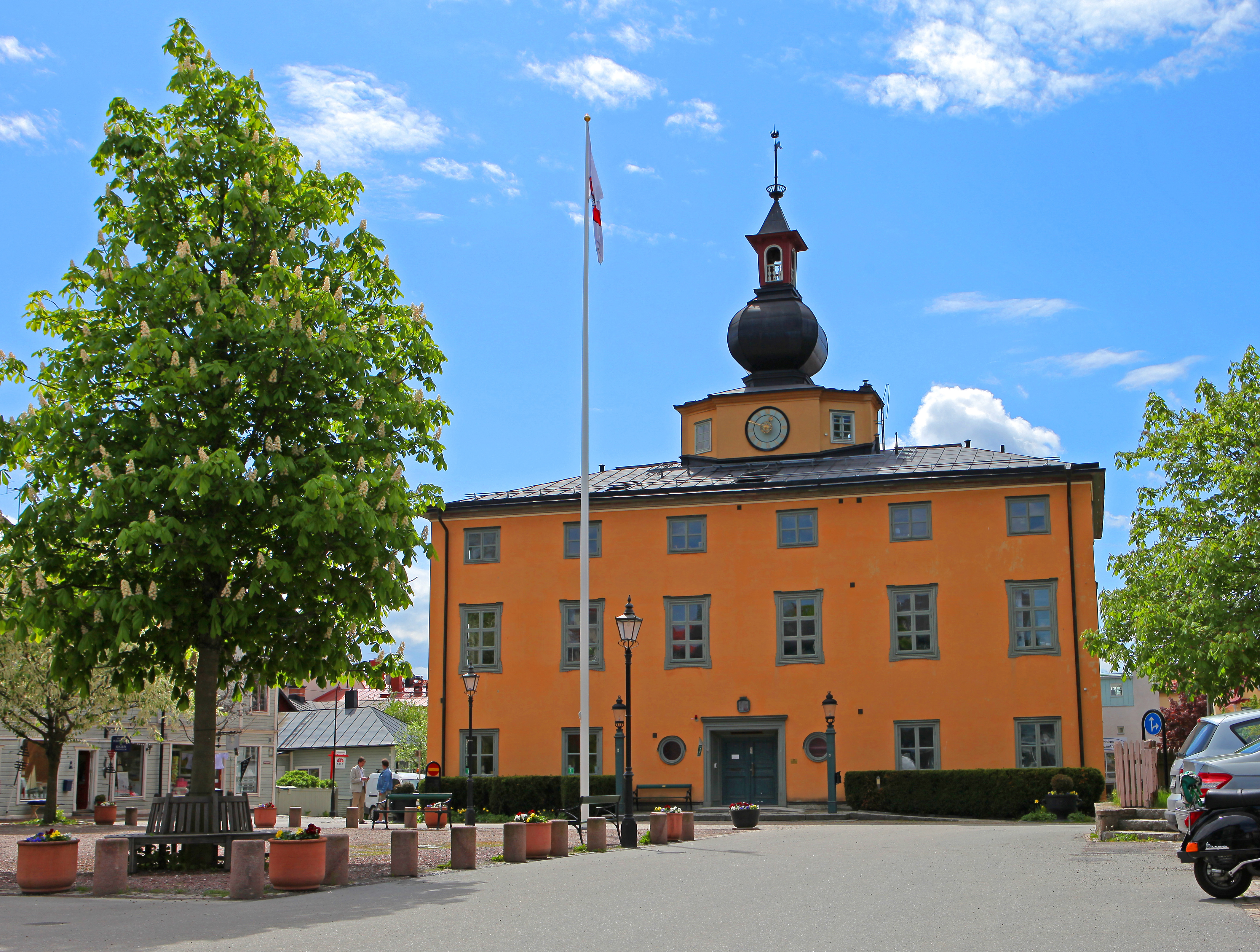 Rådhuset, Vaxholm